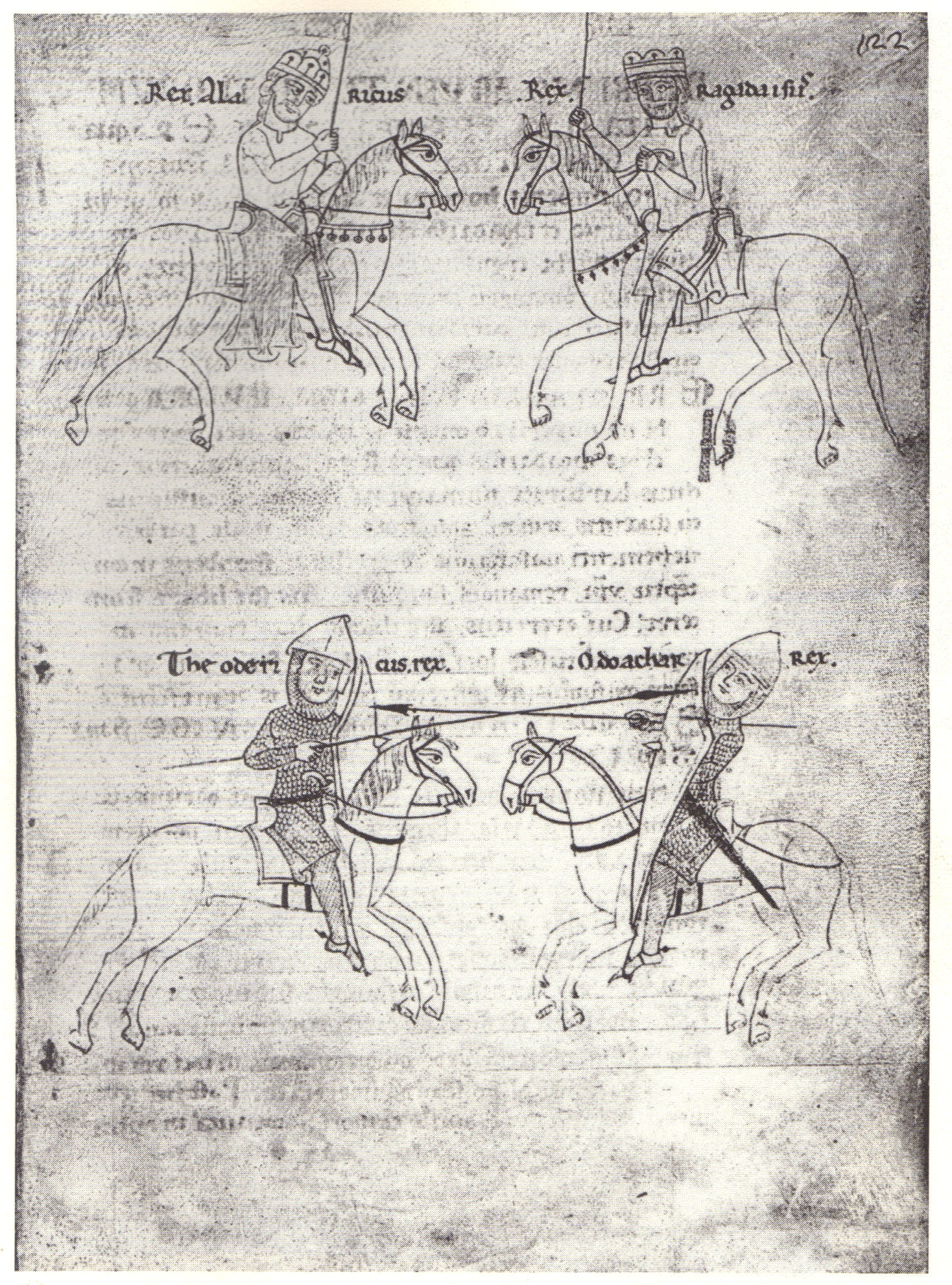 'Chronica Theodericiana', Federzeichnung: Kampf Theoderichs mit Odoaker BAV Rom, Cod. Pal. Lat. 927, Bl. 122r von 1181 aus dem Kloster Mons Olivetus in Verona